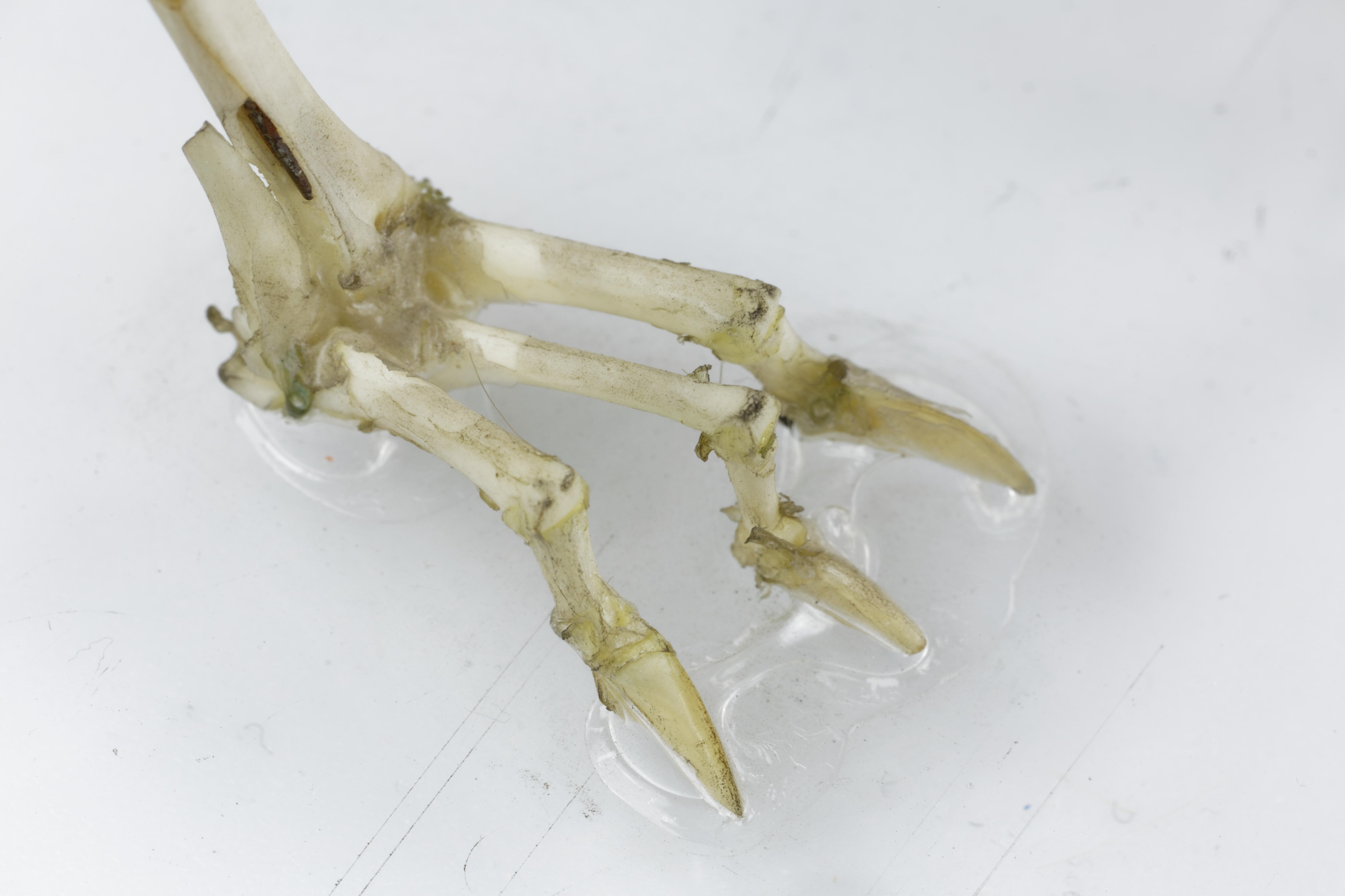 Détail de la patte arrière droite d'un squelette de gerboise des steppes Nom vernaculaire Gerboise des steppes ou gerboise du désert Nom latin Jaculus jaculus Nature du spécimen Squelette monté Place dans le règne animal Chordé, Mammifère, Rongeur, Myomorphe Provenance Collection de Zoologie de l'Université Pierre et Marie Curie (UPMC) à Paris Dimensions du socle (cm) (triangle quelconque) 14,5 - 12 - 14 - 1,1 (h) (plastique) Longueur approximative du spécimen (cm) 13 (queue non comptée) (donnée non biométrique) (10-12 pour le corps/16-20 pour la queue dans la nature) Hauteur total du spécimen (cm) environ 15,3 (donnée non biométrique) Biologie Petit rongeur des déserts avec de longues pattes postérieures. Très véloce. Sa longue queue lui sert de balancier. La gerboise vit dans un terrier.